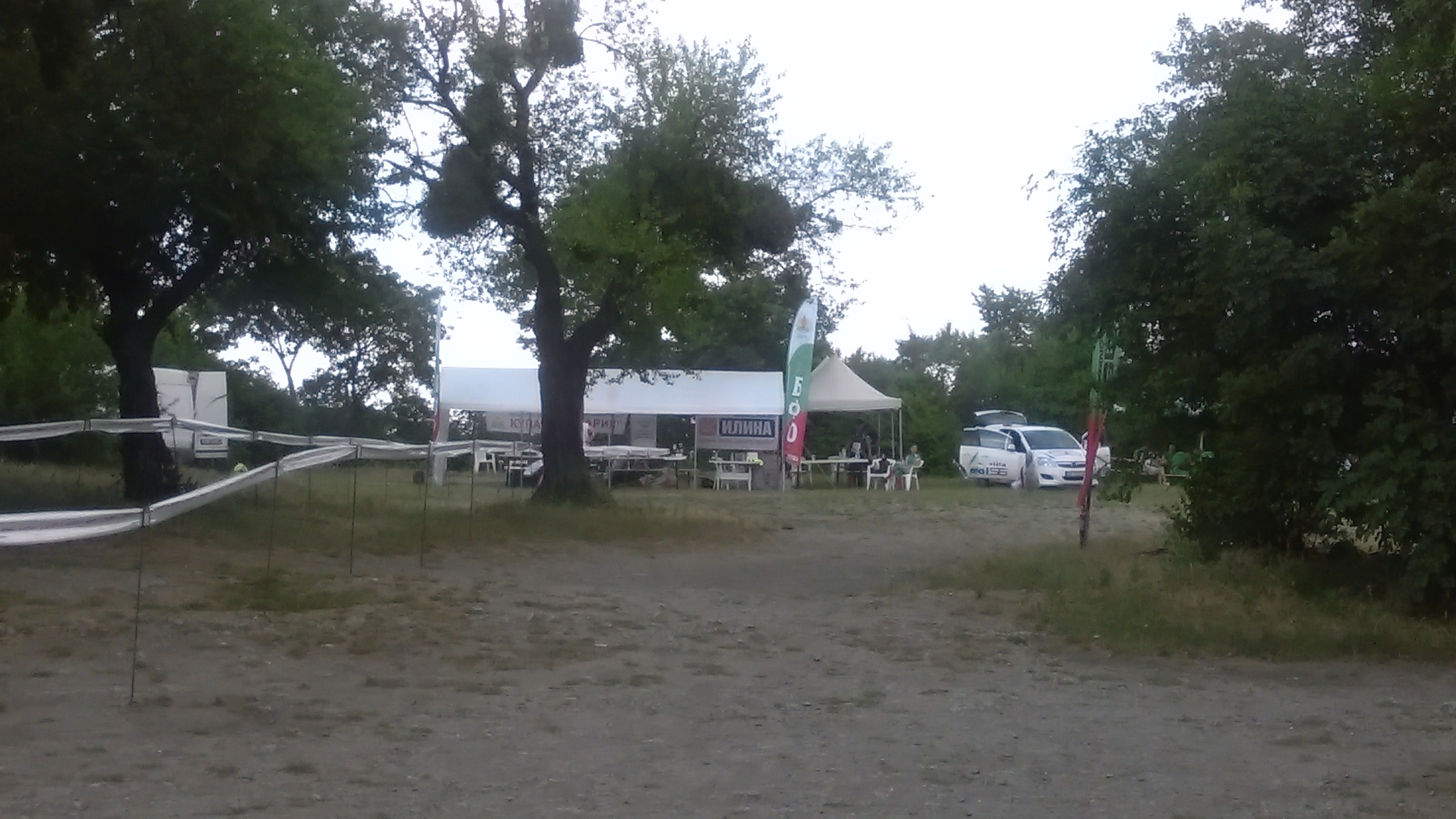 Състезание от Купа на България по спортно ориентиране, състояло се на 20 юни 2015 г. в местността „Аладжа манастир”, природен парк „Златни пясъци”